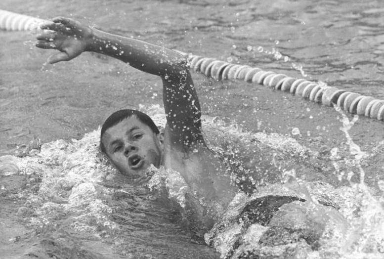 Wolfram Sperling Zentralbild Koch 26-4-69-Rostock: DDR-Hallenmeisterschaften im Schwimmen- Über 400 m Freistil der Männer erreichte Wolfram Sperling (SC DHfK Leipzig) am 25.4.69 in der Neptun-Schwimmhalle mit 4:15,4 min die schnellste Vorlaufzeit.